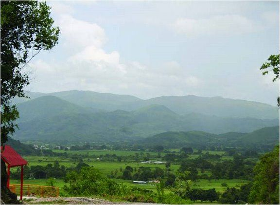 Valle de Cumanacoa